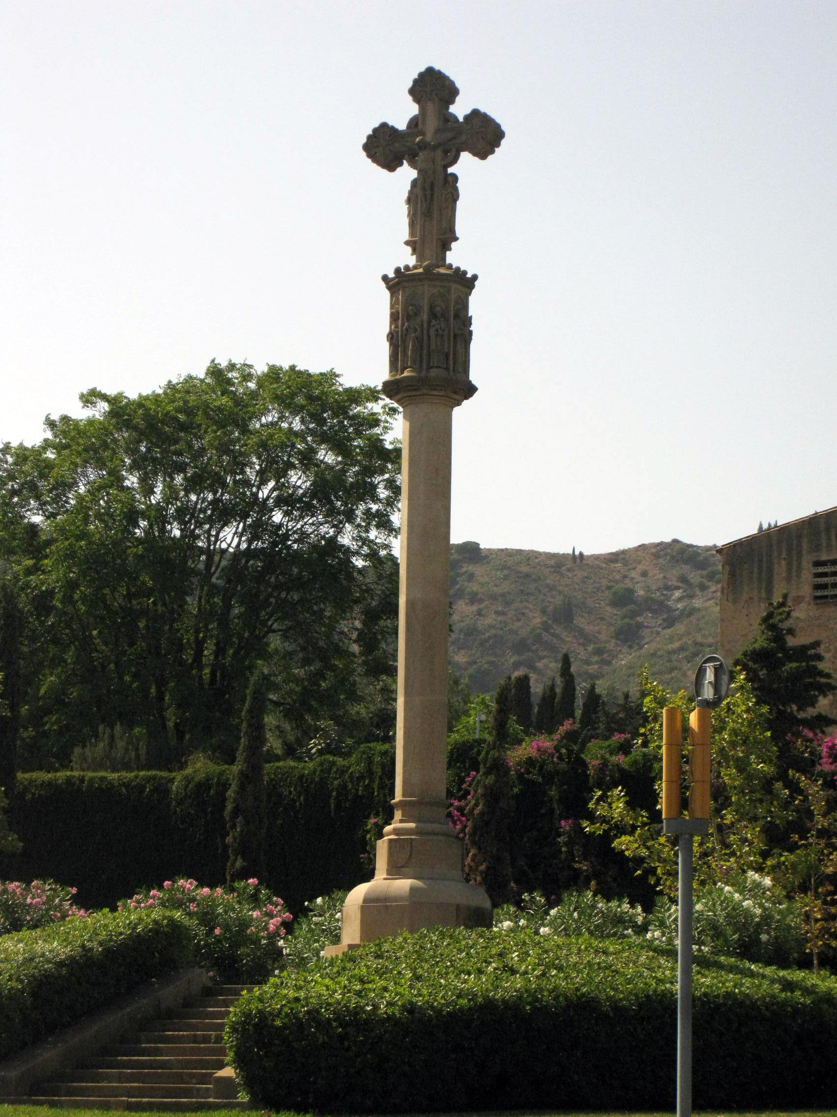 Creu de Pedralbes (Lluís Bonet Garí). Av. Pedralbes, pl. de la Creu de Pedralbes (Barcelona)